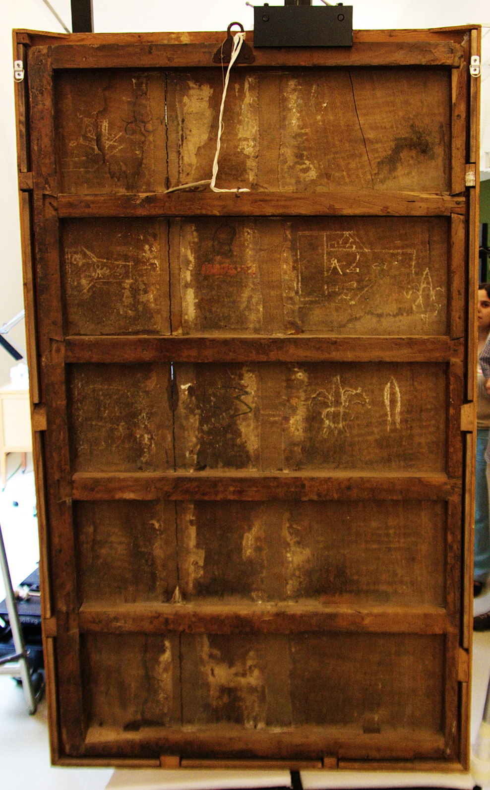 Un dels plafons del retaule de Sant Esteve de Granollers, durant la seva restauració al MNAC.